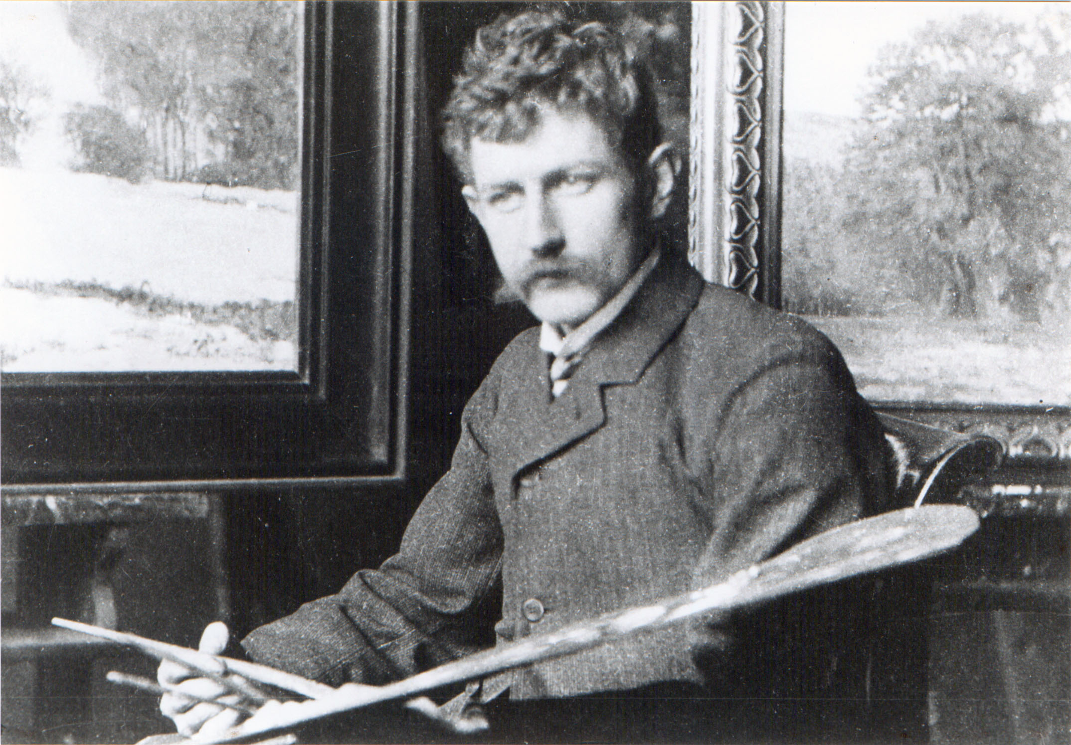 schwarz-weiß Photo des Malers Paul Scheffer mit Pinsel und Palette